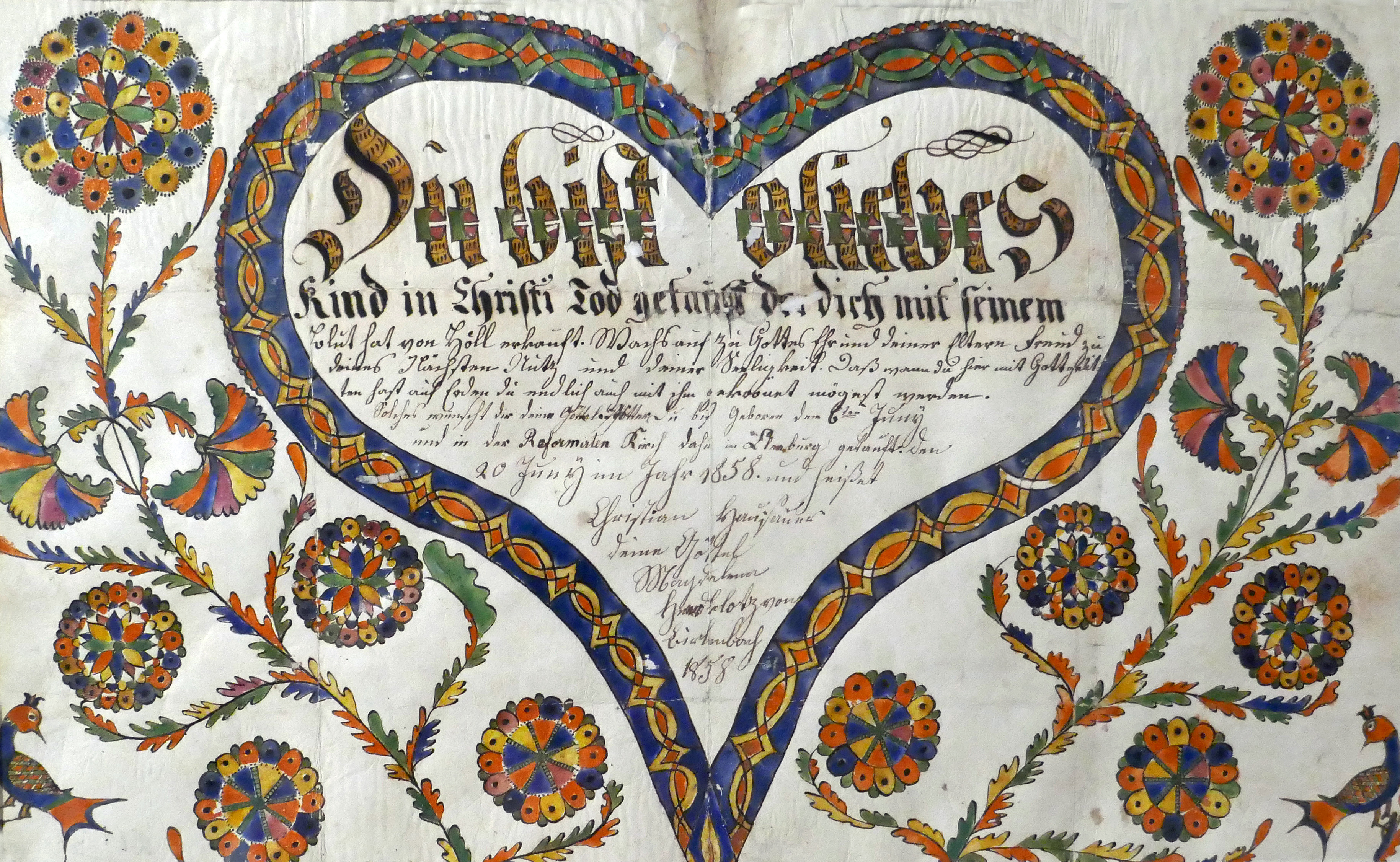 Lettre de baptême manuscrite, décor peint d'un coeur et de fleurs. Birlenbach, 1858. Elle comporte le texte reproduit pendant près de 100 ans dans de nombreuses lettres, manuscrites ou imprimées : Du bist, o liebes Kind, in Christi Todt getauft ("Tu as été baptisé, cher enfant, dans la mort du Christ"). Exposition Vies protestantes : le mot et l'image au Musée alsacien de Strasbourg (2017)